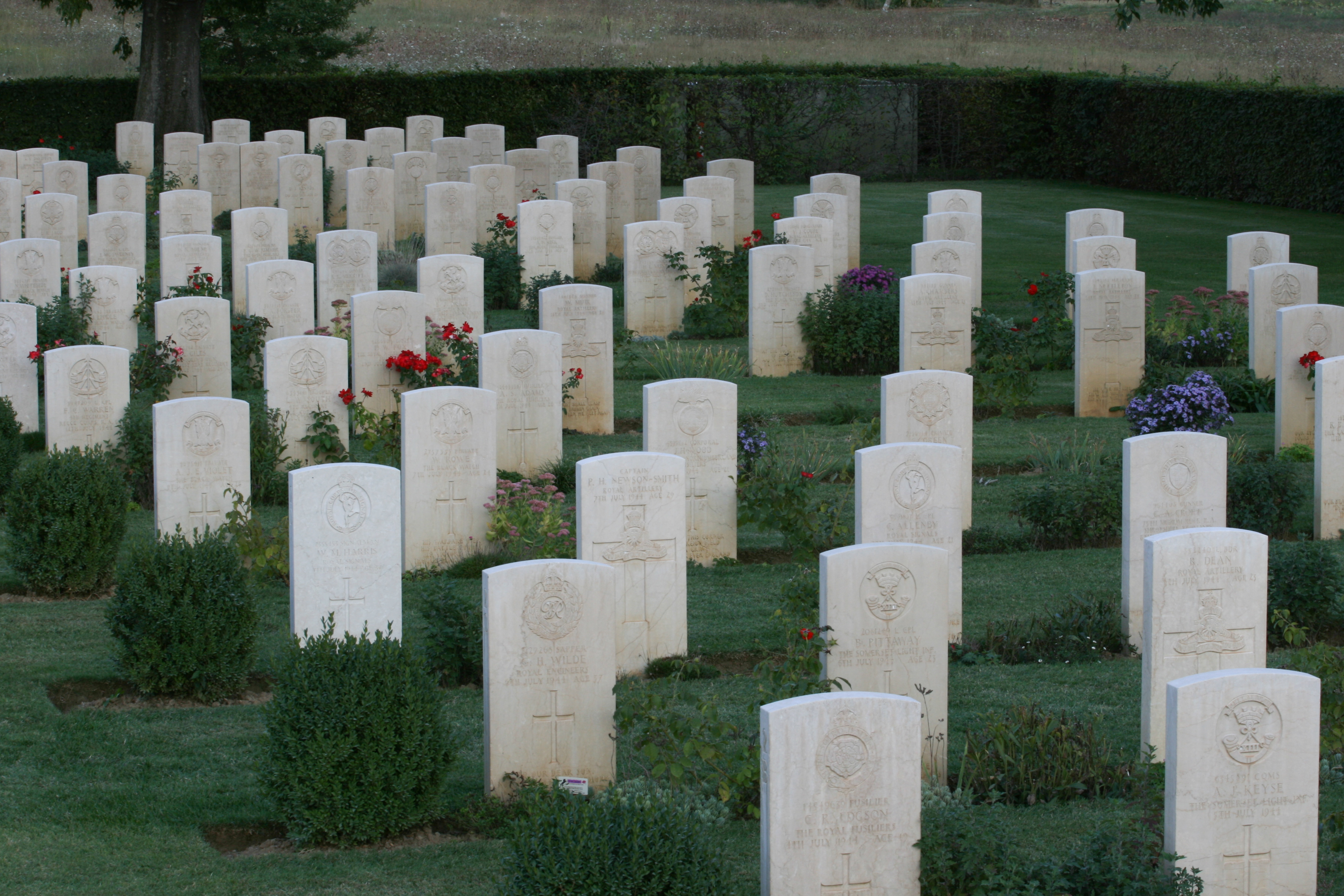 Cimitero Monumentale This is a photo of a monument which is part of cultural heritage of Italy.